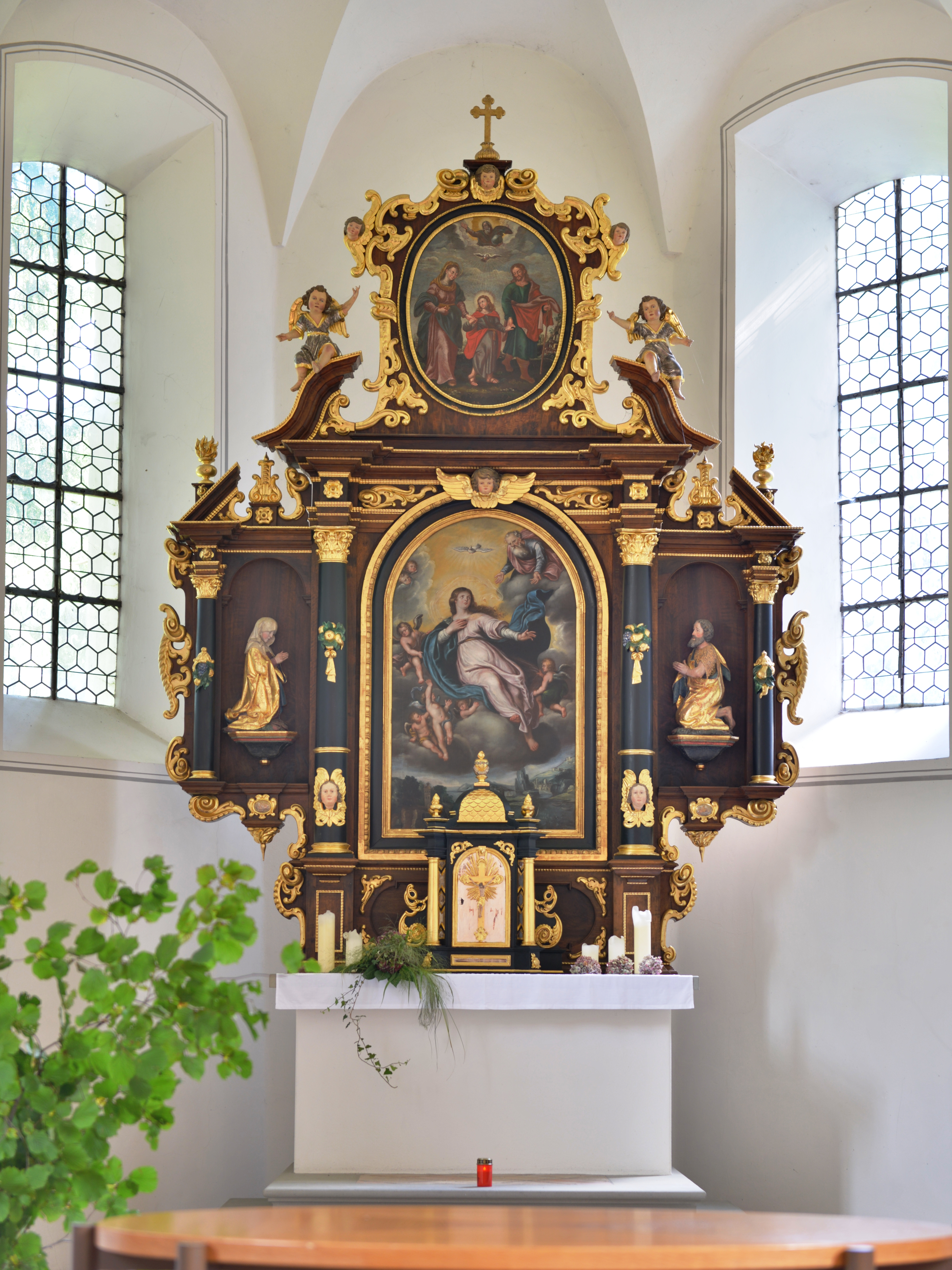 Alte Pfarrkirche Hll. Cornelius und Cyprian, in Tosters bei Feldkirch in Vorarlberg.